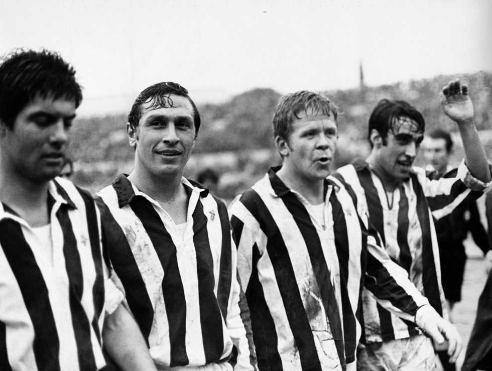 Roma, stadio Olimpico, 28 dicembre 1969. Da sinistra: i calciatori juventini Sandro Salvadore, Lamberto Leonardi, Helmut Haller e Pietro Anastasi escono soddisfatti dal campo al termine della sfida tra Roma e Juventus (0-3) valevole per la 14ª giornata del campionato italiano di Serie A 1969-70.